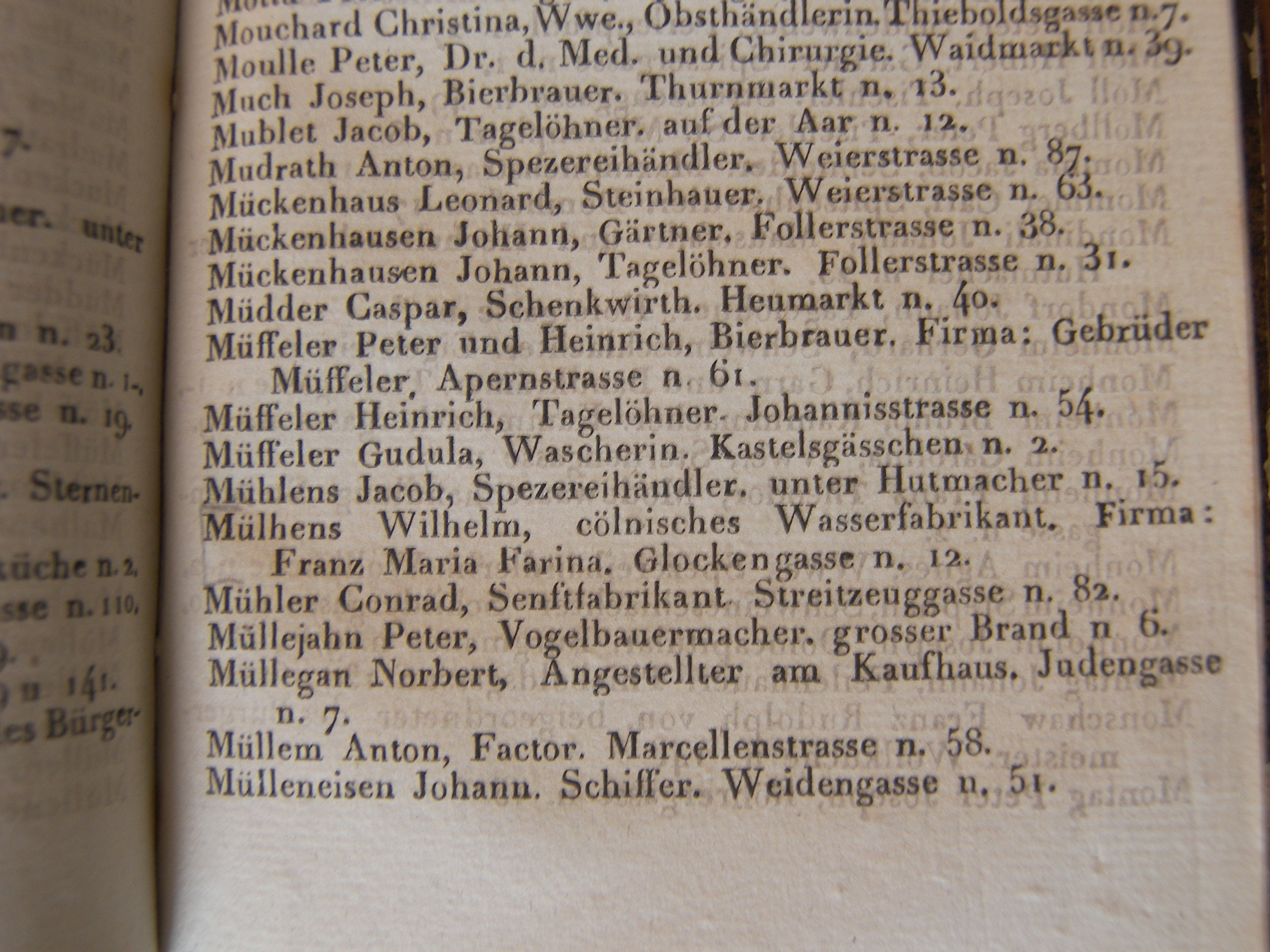 Address-Buch der Stadt Cöln von 1831 Seite 261